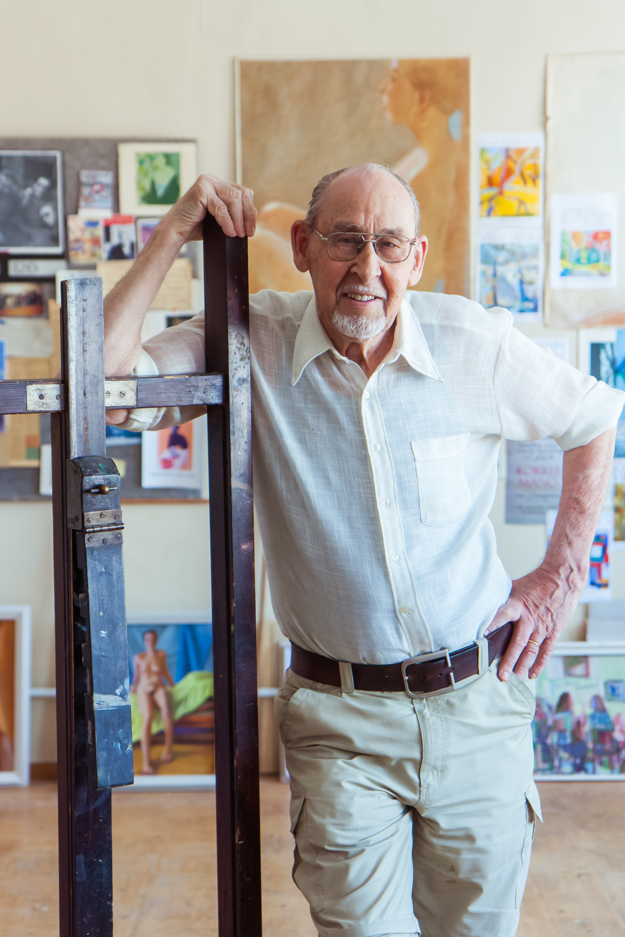 Eesti maalikunstnik ja -õpetaja ning raamatugraafik Heldur Viires Tartus, Konrad Mägi ateljees.